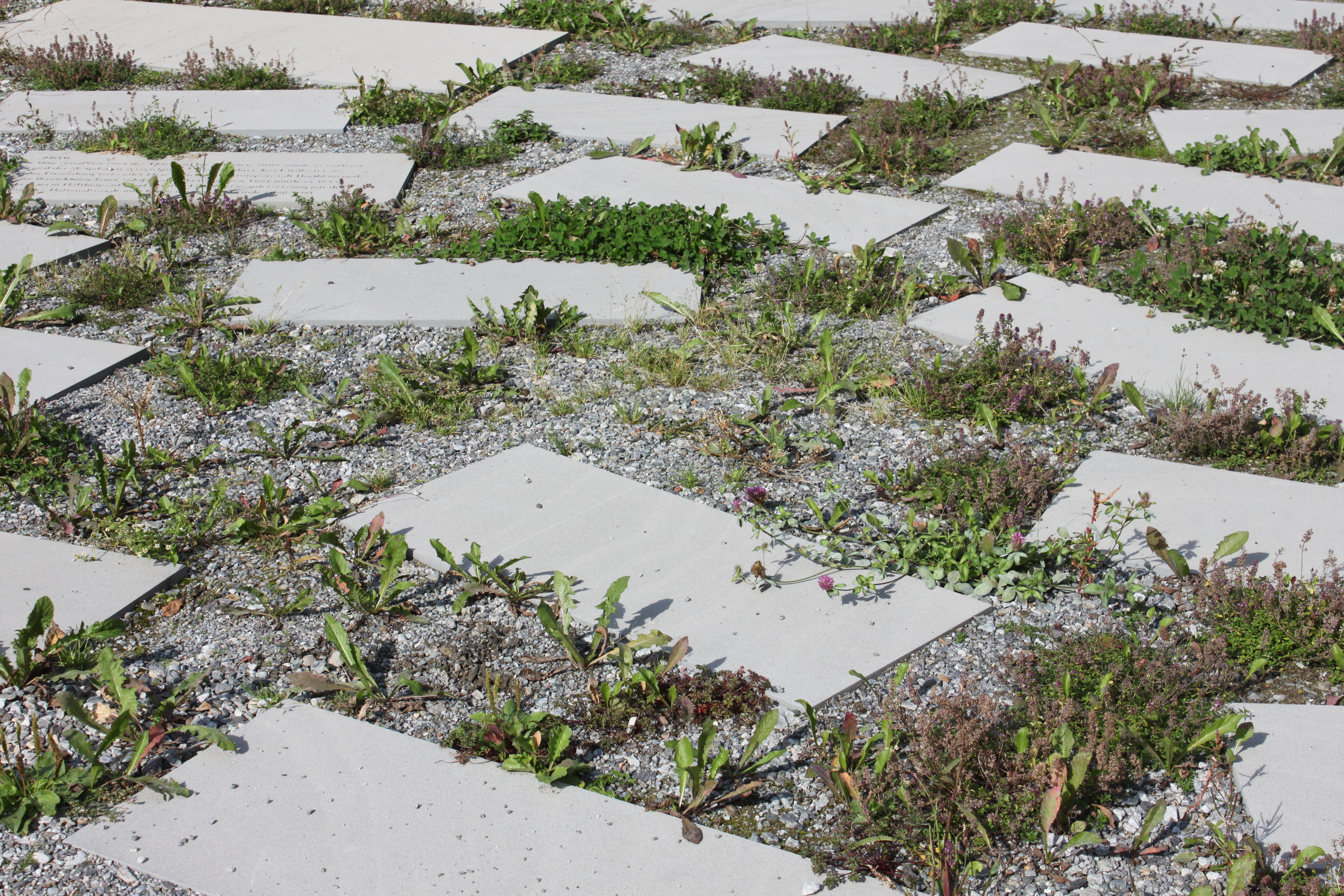 Neues Kriegerdenkmal Silbertal 2010, Plattenfeld, Detailausschnitt